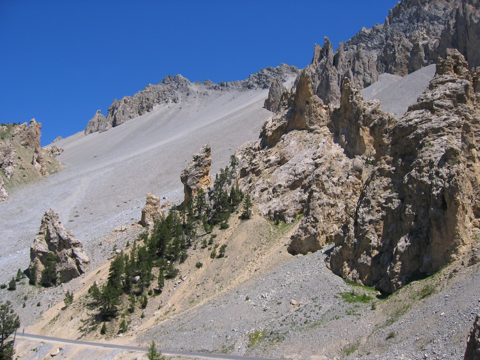 Casse Déserte, Queyras, Hautes-Alpes, France